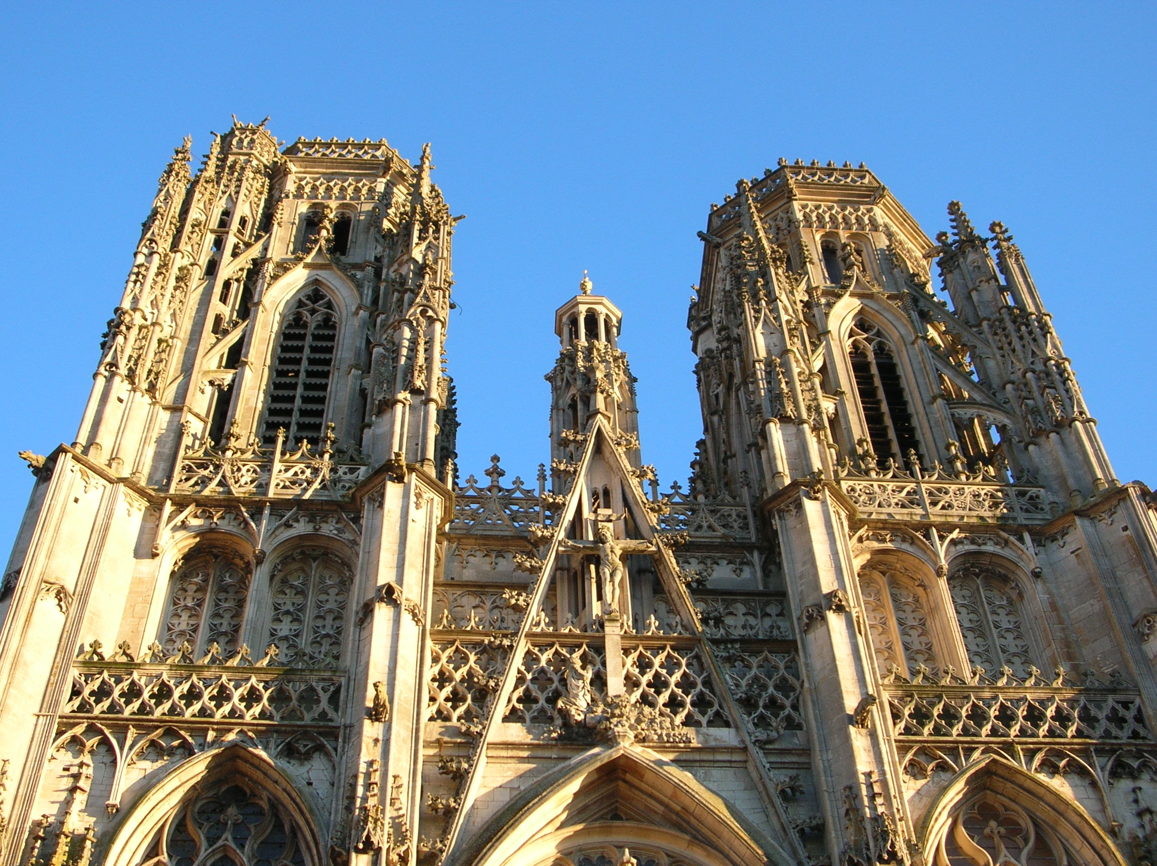 Vue de la Place du Général de Gaulle, début de construction 1221et se pousuit du 13è au 15è siècle.